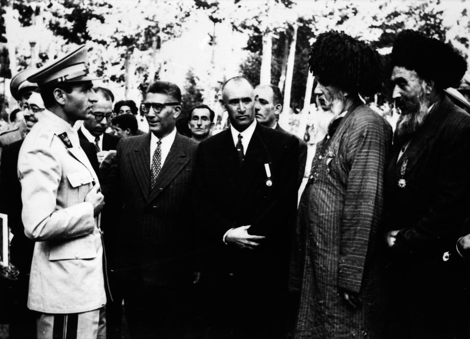 17 شهریور 1332: شایع شد که سفیر جدید روسیه (آناتولی لاورِنتیو) دست به خودکشی زده و این باعث بیماری سخت او شده است. سران قبایل نزدیک به روسیه مانند ترکمن ها به تهران آمده و از قانون اساسی جدید او دفاع کردند.